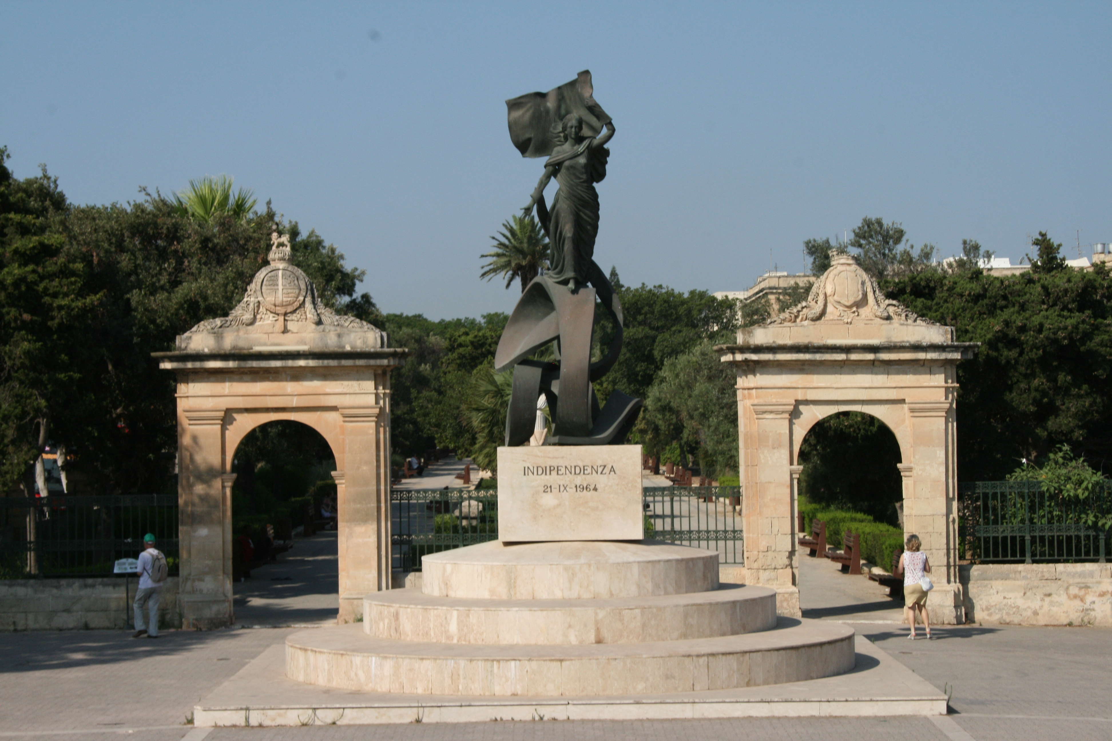 Denkmal an die Unabhängigkeit Maltas in Floriana